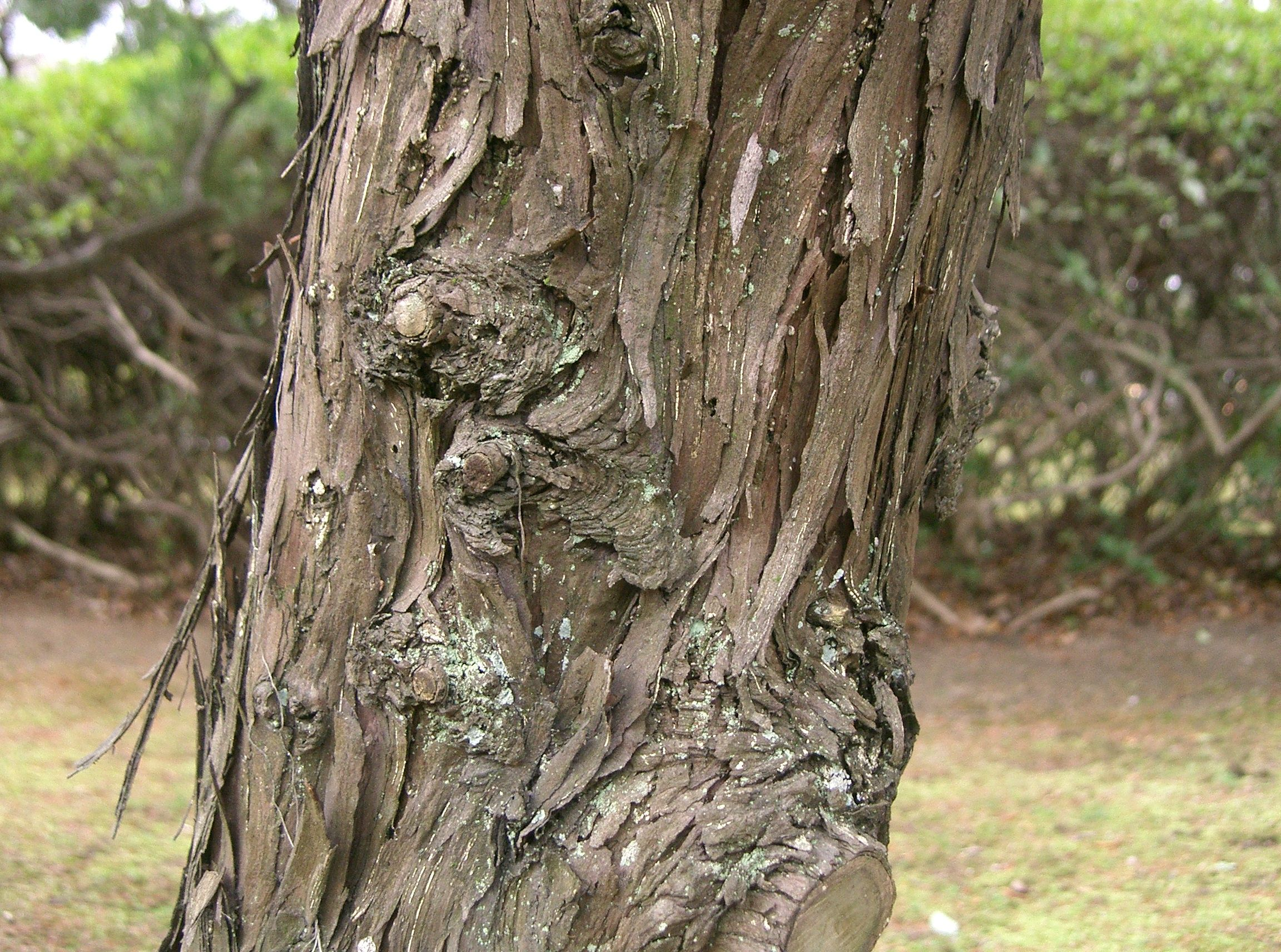 Juniperus chinensis 'Kaizuka'